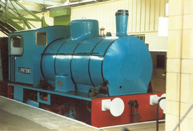 Darlington